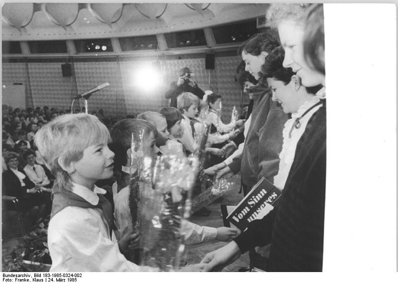 Berlin, Jugendweihe, Feierstunde ADN-ZB Franke 24.3.85 Berlin: Jugendweihe. Erste Glückwünsche für die 74 Schüler der 18. Oberschule Martin Weise aus Lichtenberg, die in der Kongreßhalle die Jugendweihe erhalten haben. Mehr als 8000 Mädchen und Jungen legten am 24.3. zu Beginn der diesjährigen Jugendweihefeiern ihr Gelöbnis ab.